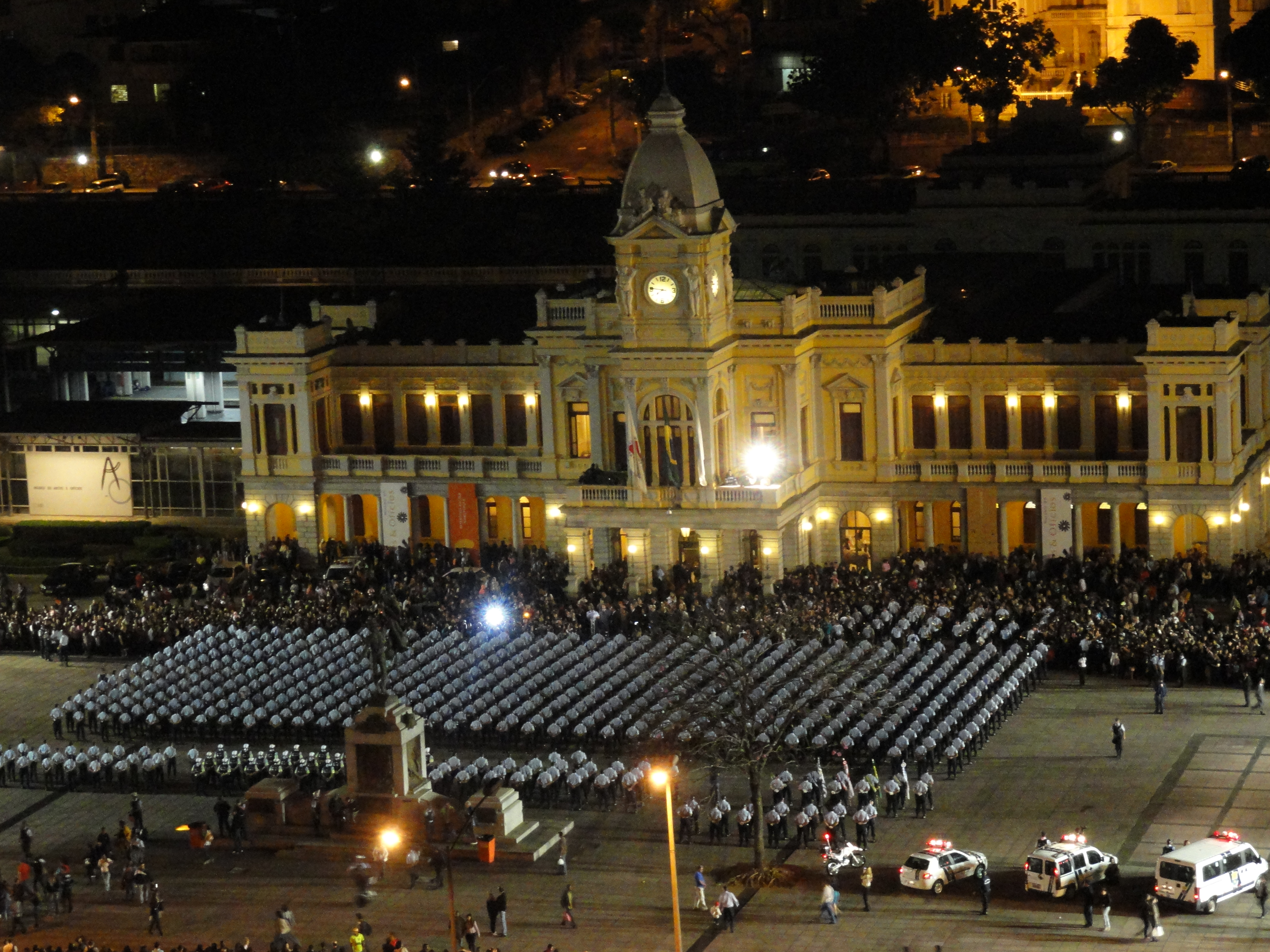 Cerimônia de posse dos guardas municipais de Belo Horizonte, realizada na Praça da Estação, em 2011.